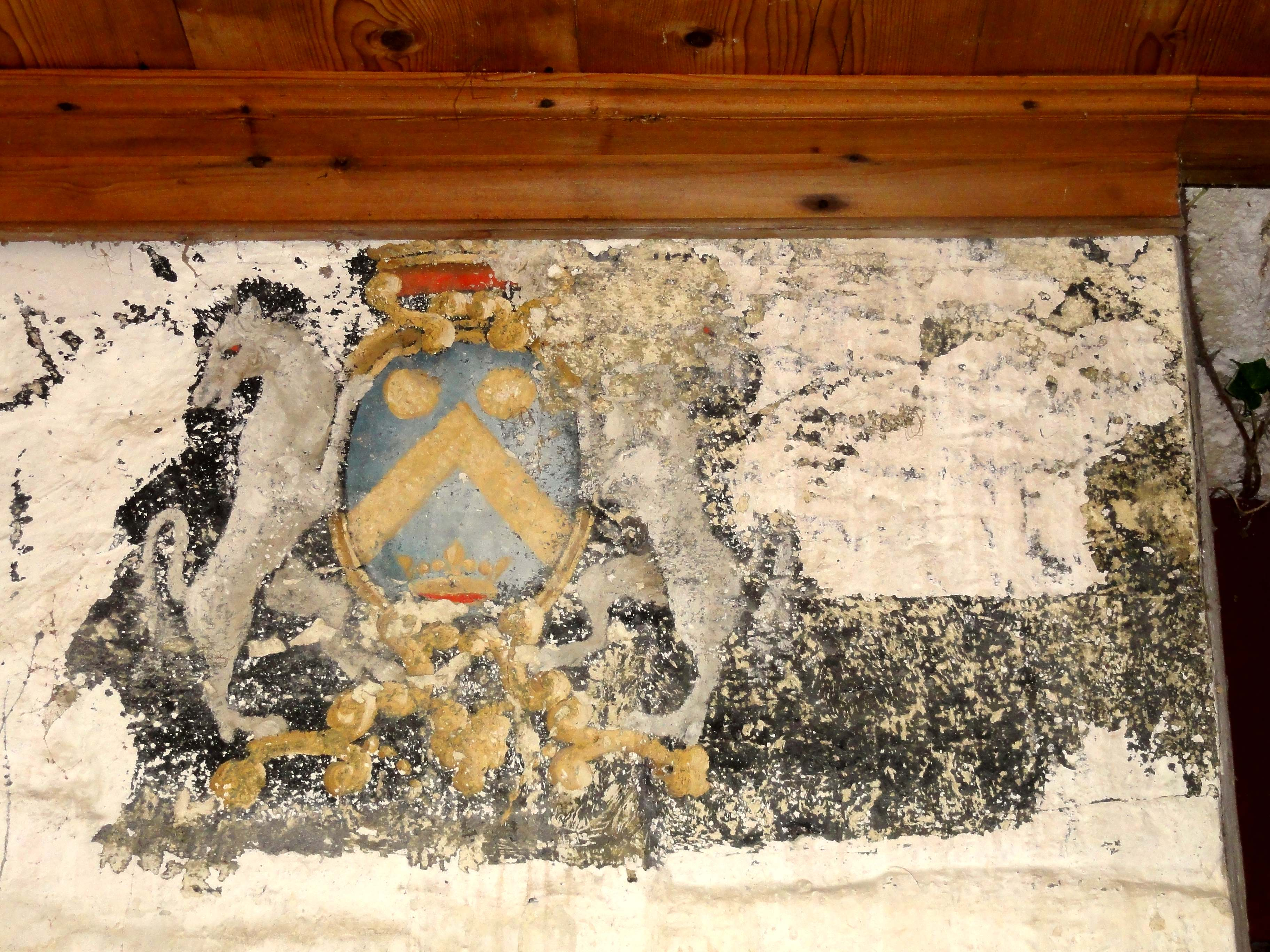 Intérieur de l'église (voir titre).